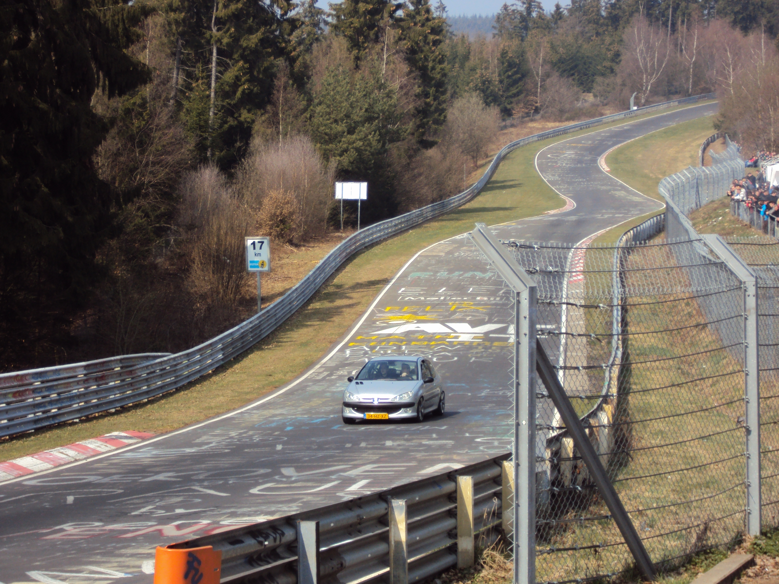 Streckenabschnitt Pflanzgarten mit kleinem Sprunghügel der Nürburgring-Nordschleife.